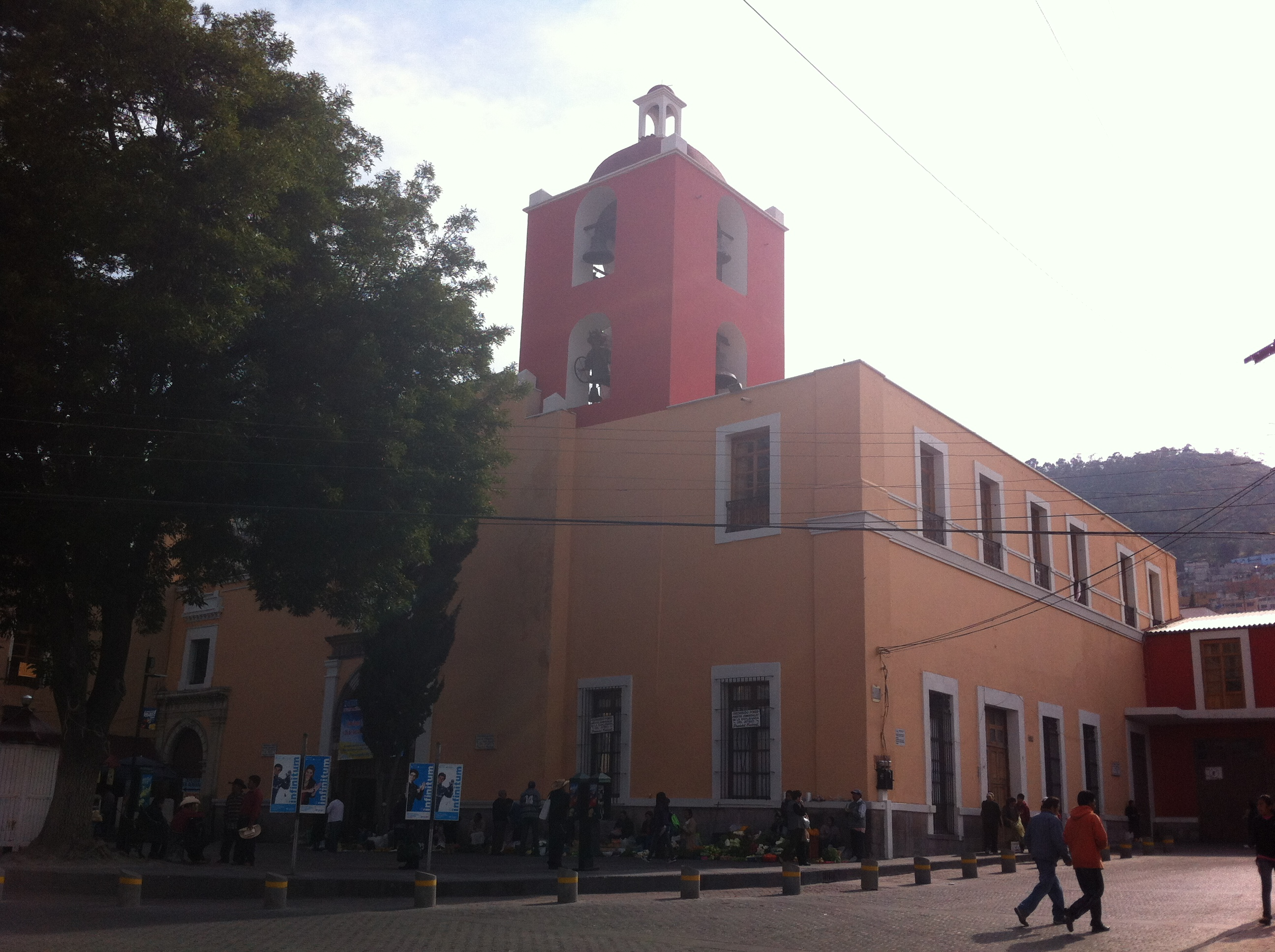 Parroquia de la Asunción